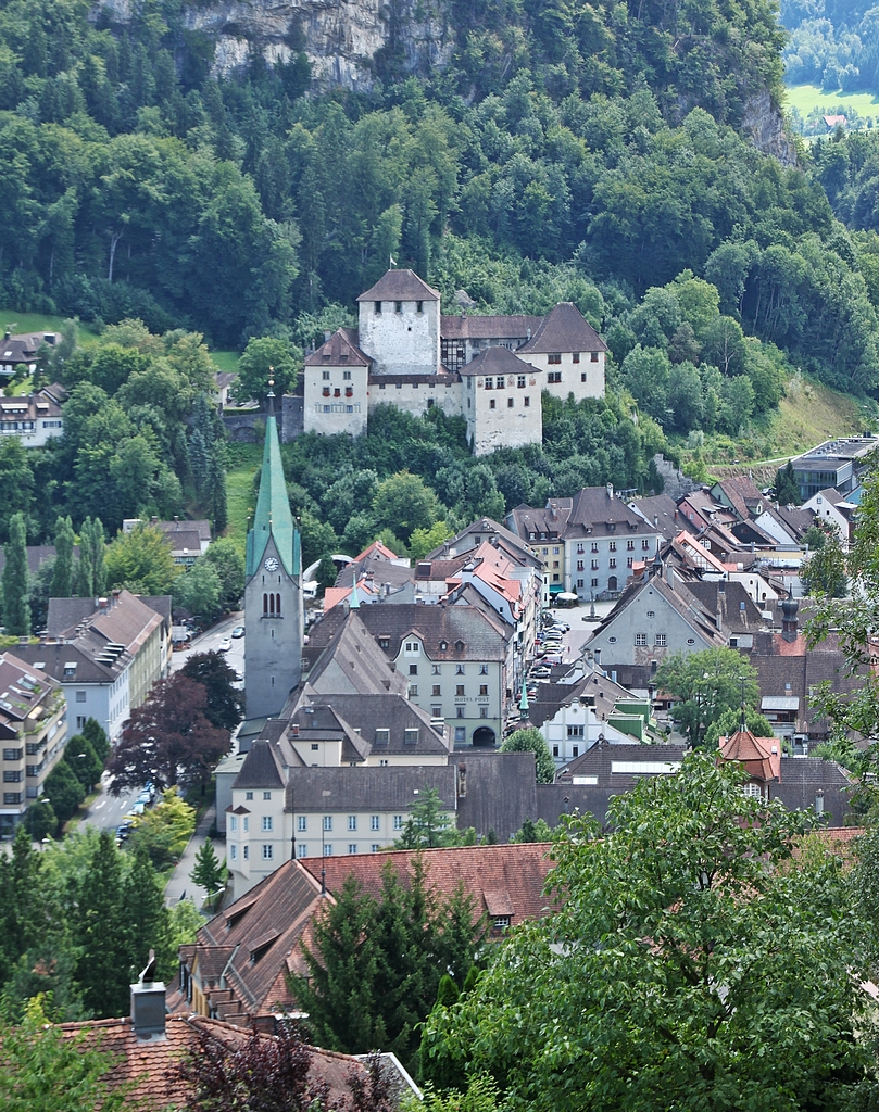 Feldkirch (Vorarlberg): Blick vom Ardetzenberg zum Dom und zur Schattenburg.